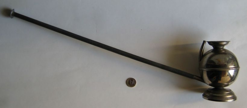 Die Pettibone Pustlichtlampe von 1895. Durch das Pusten in das lange Rohr wird Magnesiumpulver aus dem Vorrat in die heiße Lampe des Brenners geblasen. Sonstiges: ...